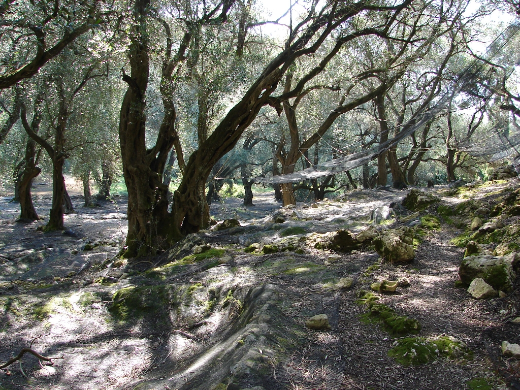 Olivenhain auf Korfu